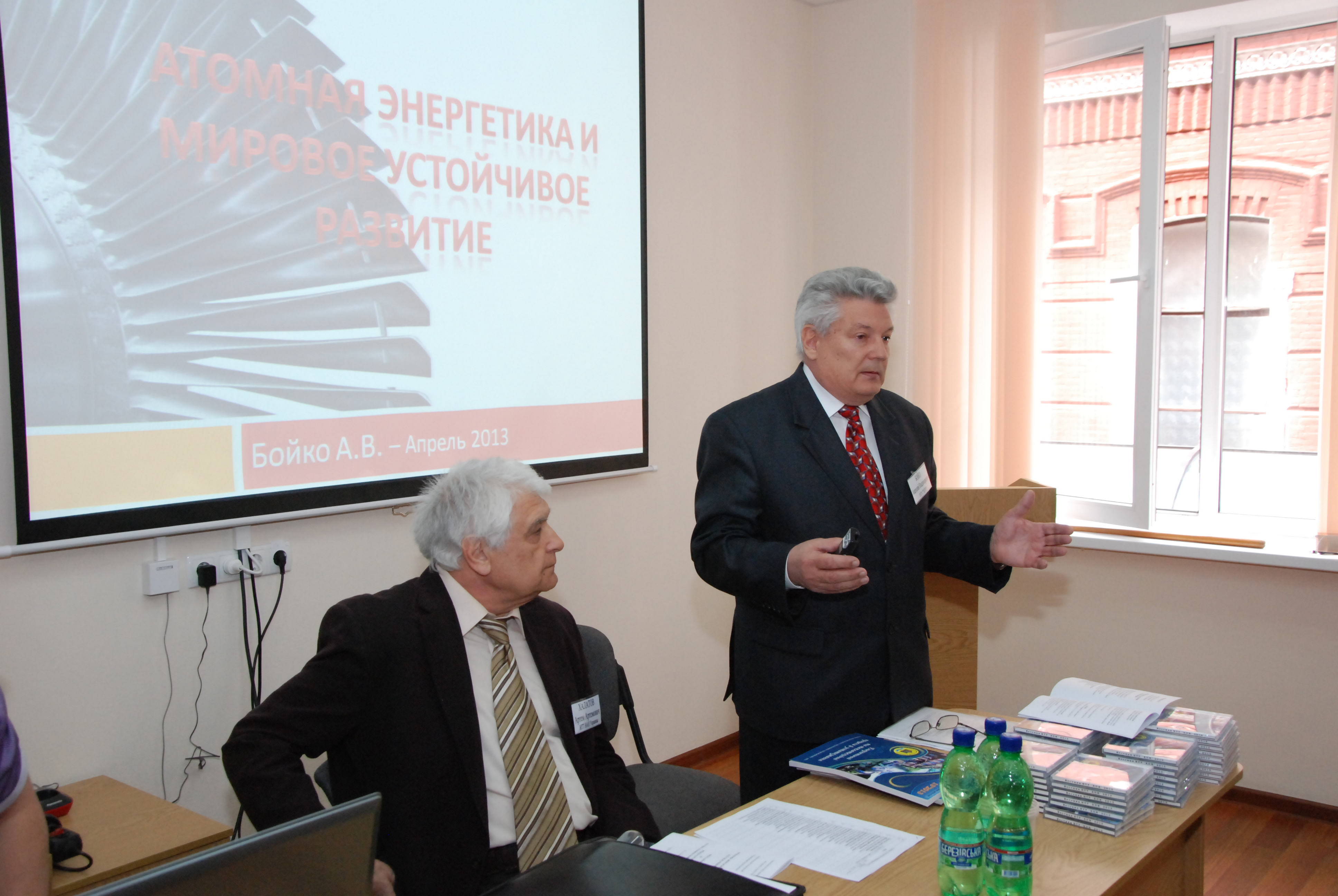 Международная конференция «Энергетические и теплотехнические процессы и оборудование» 2014 г. Академик Национальной академии наук Украины А. А. Халатов и А. В. Бойко.